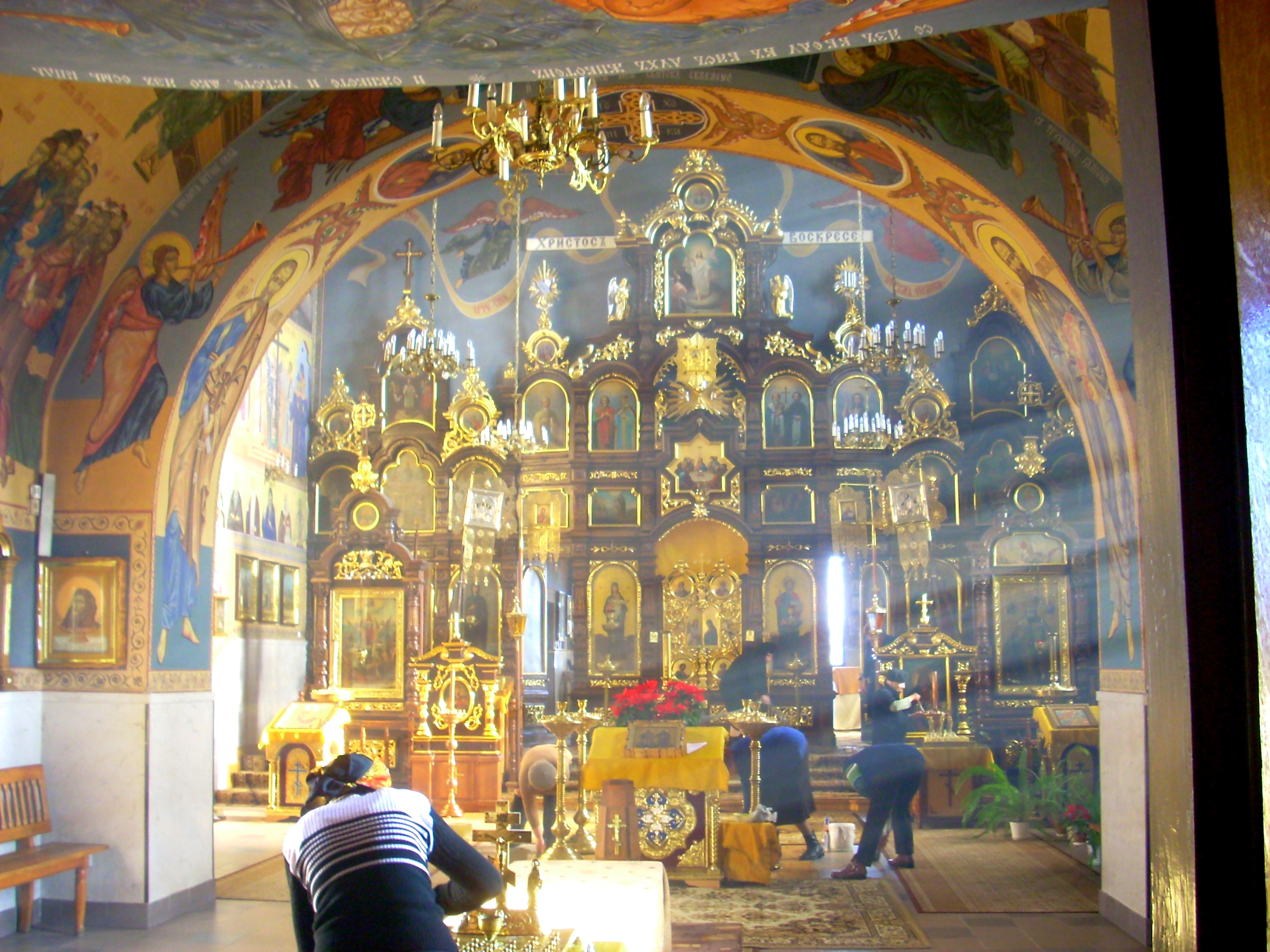 Wnętrze cerkwi św. św. Piotra i Pawła w Siemiatyczach